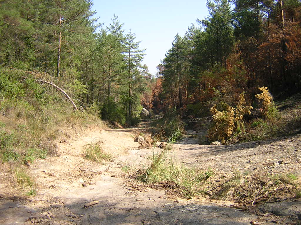 El torrent de la Cucalera (Monistrol de Calders, Moianès)